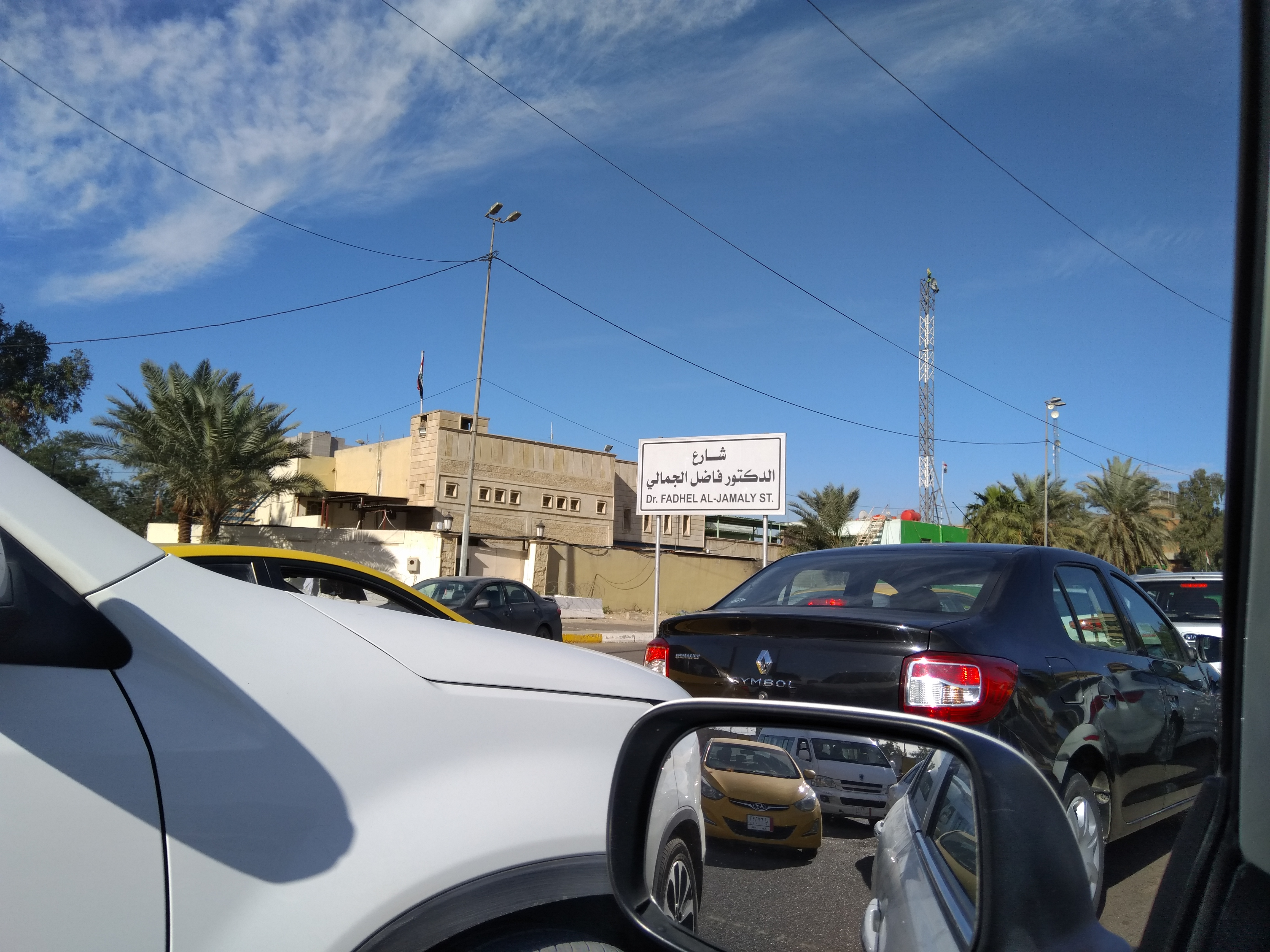 Fadhel al-Jamali St. in Baghdad